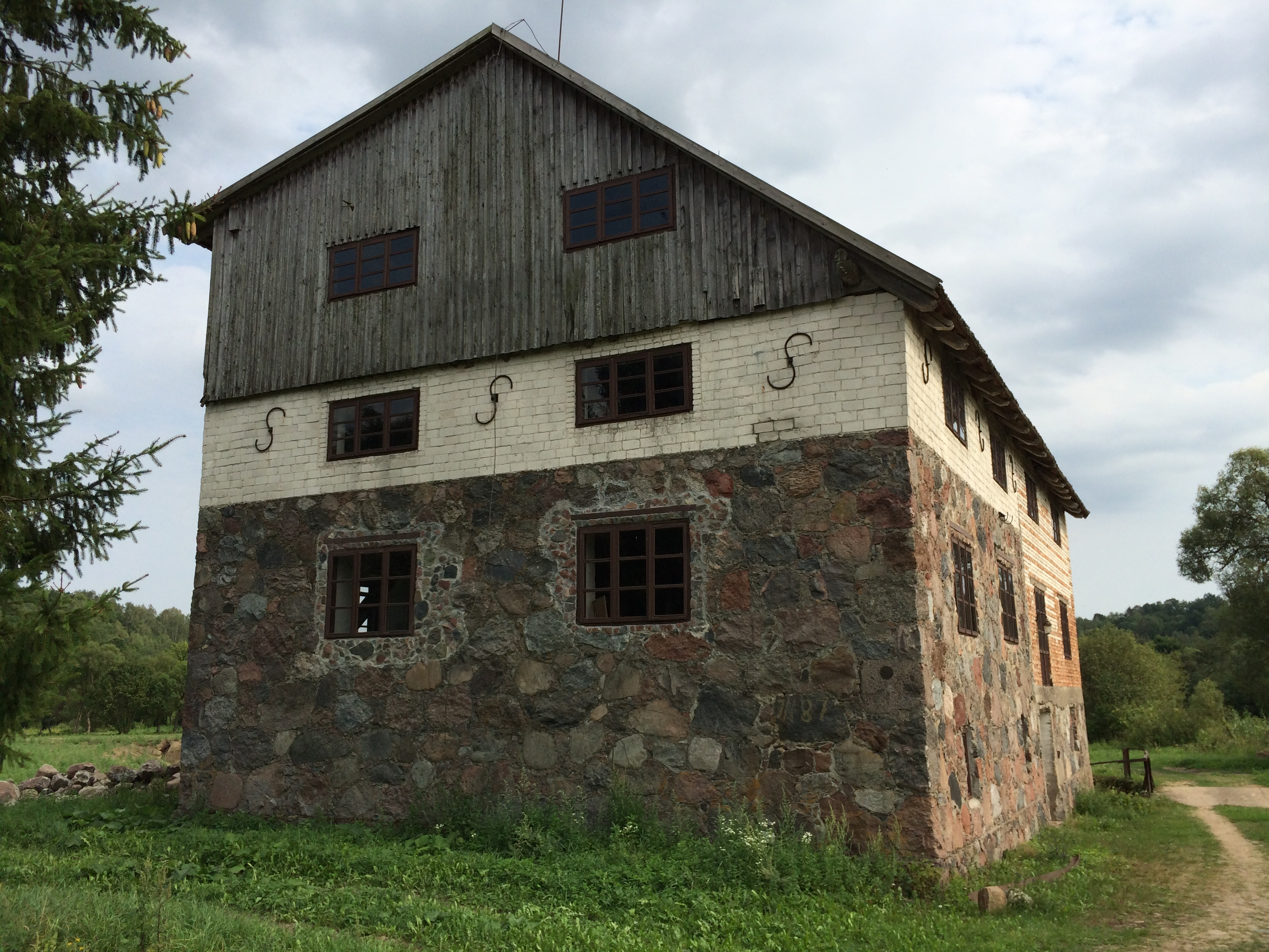 Maslaukiškio vandens malūnas